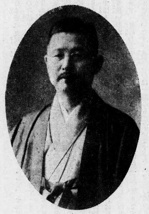 高橋義雄（1861-1937）